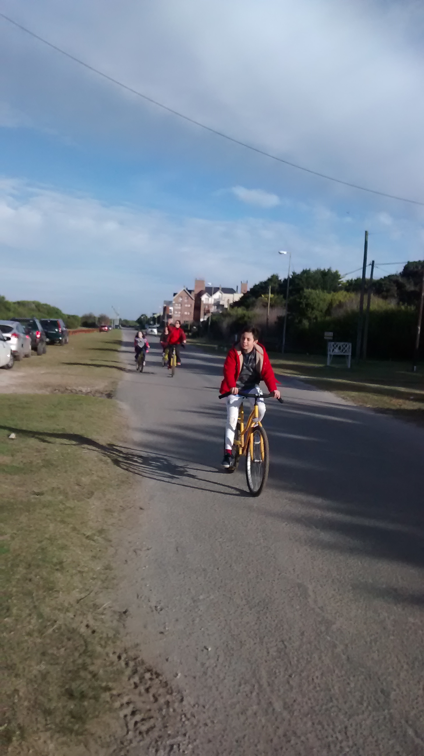 Gente andando en bicicletas. Los combustibles arrojan hidrocarburos al aire que respiramos contaminándolo, es por eso que si promovemos el uso de medios de transportes no contaminantes estamos promoviendo al cuidado del medio ambiente y a fomentar actitudes sostenibles.